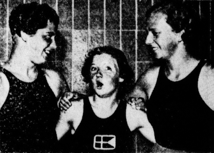 Jopie Waalberg, Inge Sørensen en Nida Senff.Original caption: "En hier de twee andere Hollandsche zwemkampioenen, die aan de Indische tournée zullen deelnemen: links Jopie Waalberg, rechts Nida Senff. In het midden de Deensche zwemkampioene Inge Sörensen."